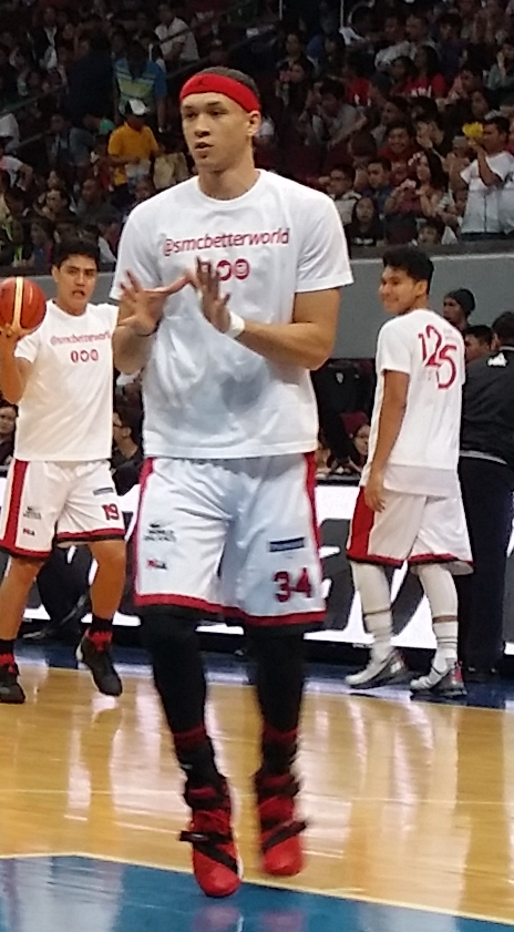 PBA - Manila Clasico (Star vs Ginebra) - Chris Ellis - Ginebra - 2015-1225